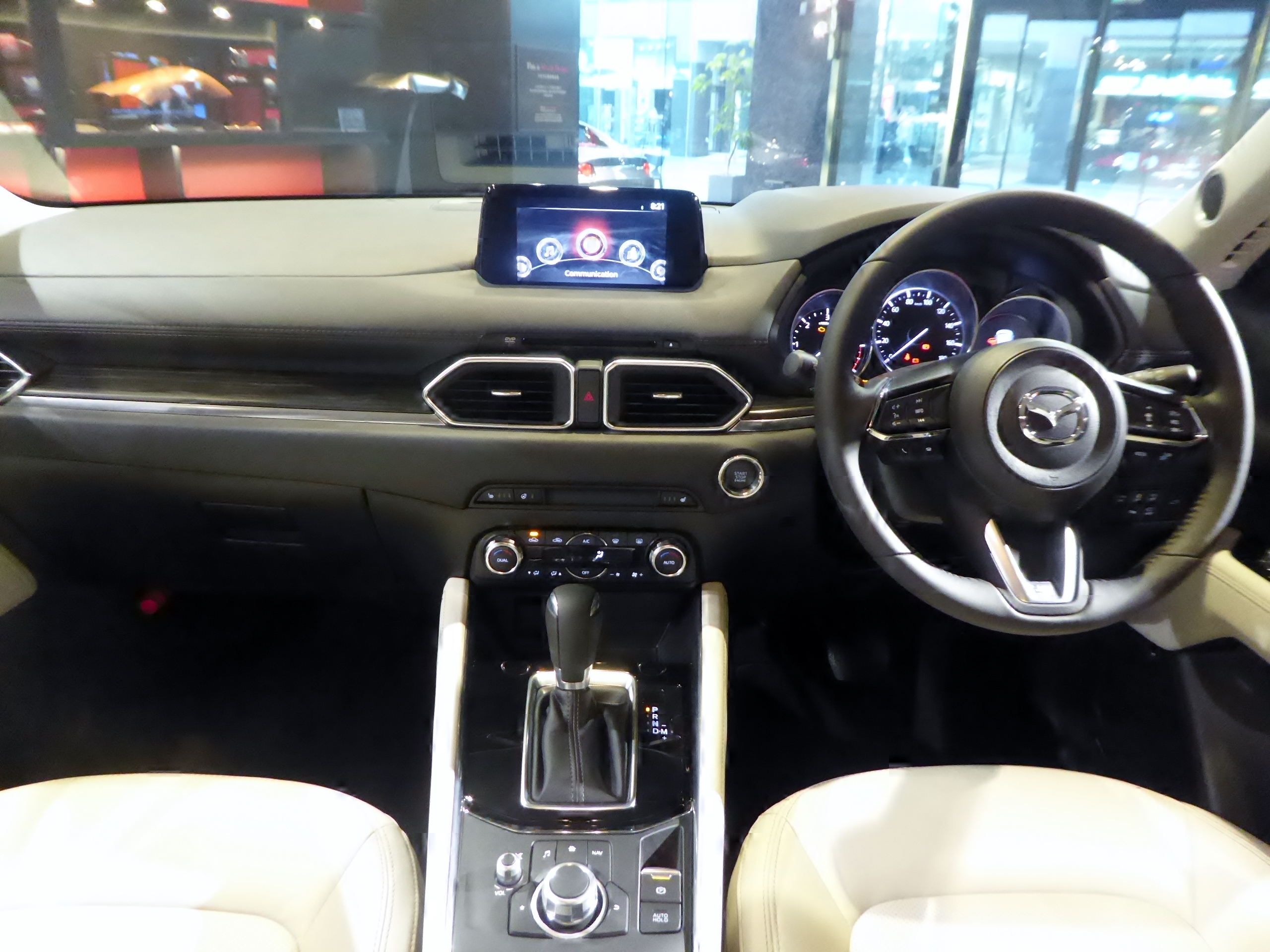 LDA-KF2P型マツダ・CX-5 XD Lパッケージ 2WDのインテリアを撮影。